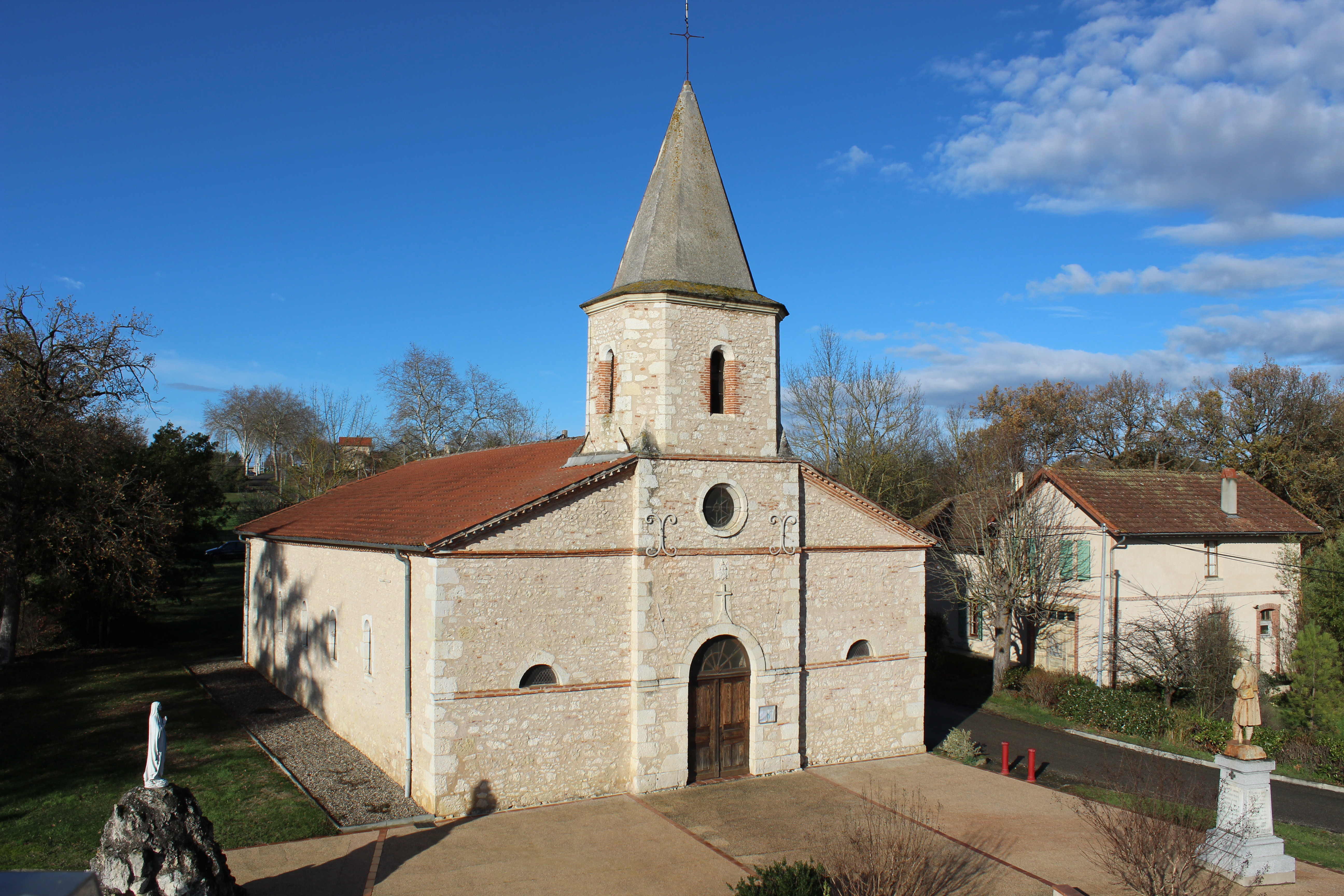 Church